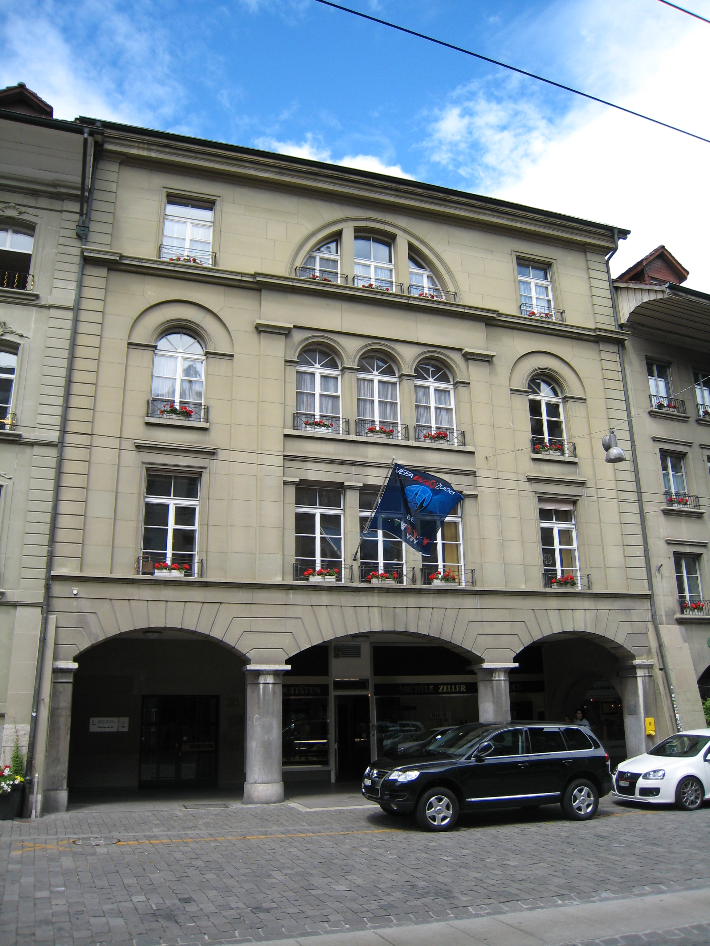 Polizei- und Militärdirektion des Kantons Bern, Kramgasse 20, Bern (Schweiz)